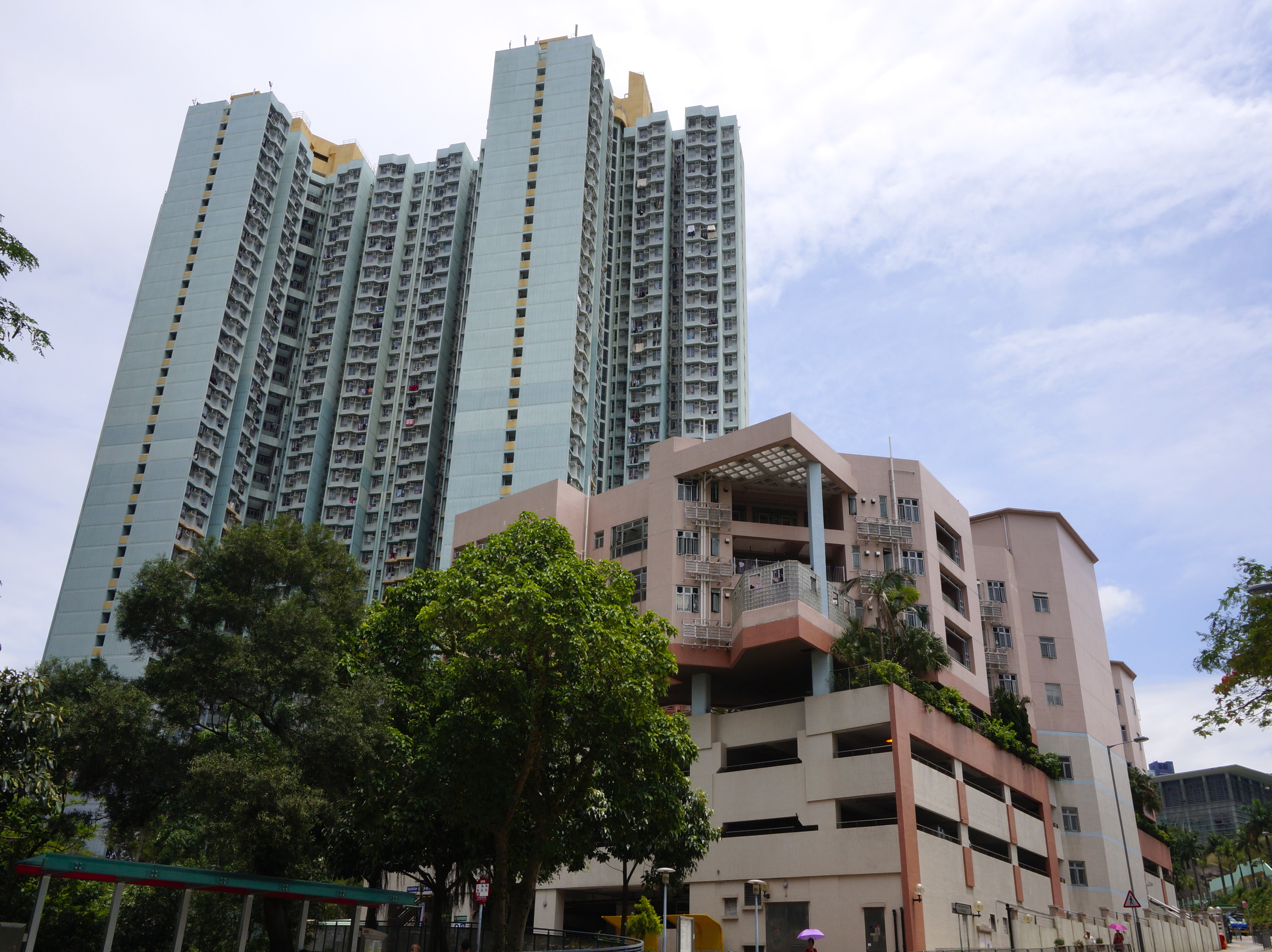 白田邨的盛田樓、昌田樓與瑞田樓